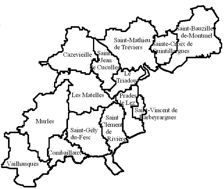 Le canton des Matelles Image personnelle